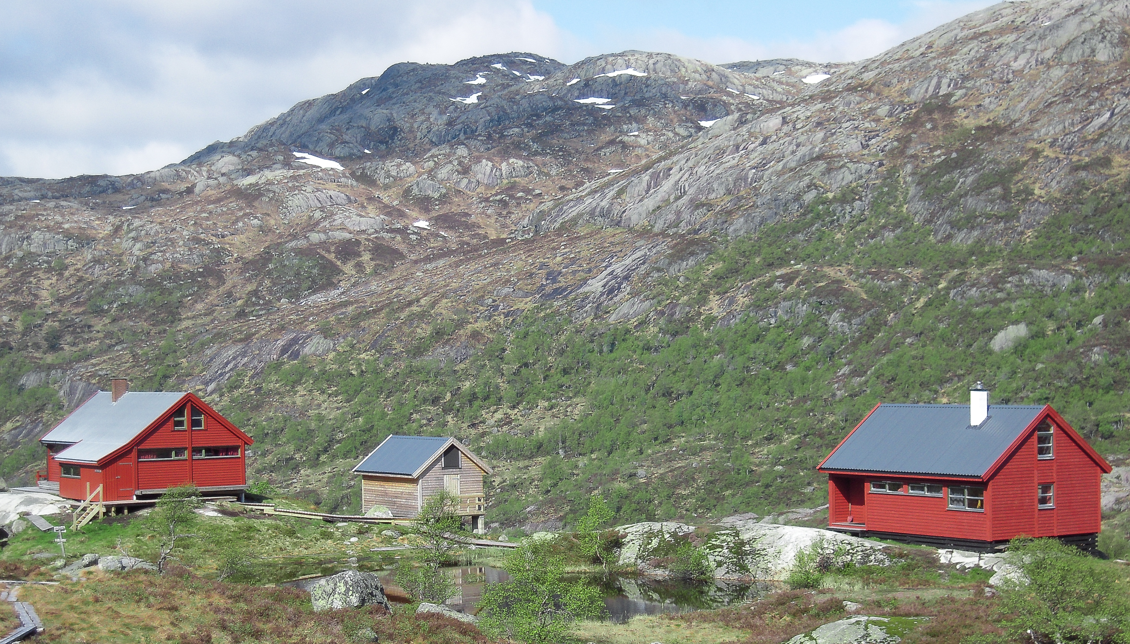 Blåfjellenden Turisthytte (Rogaland) tatt en maidag.